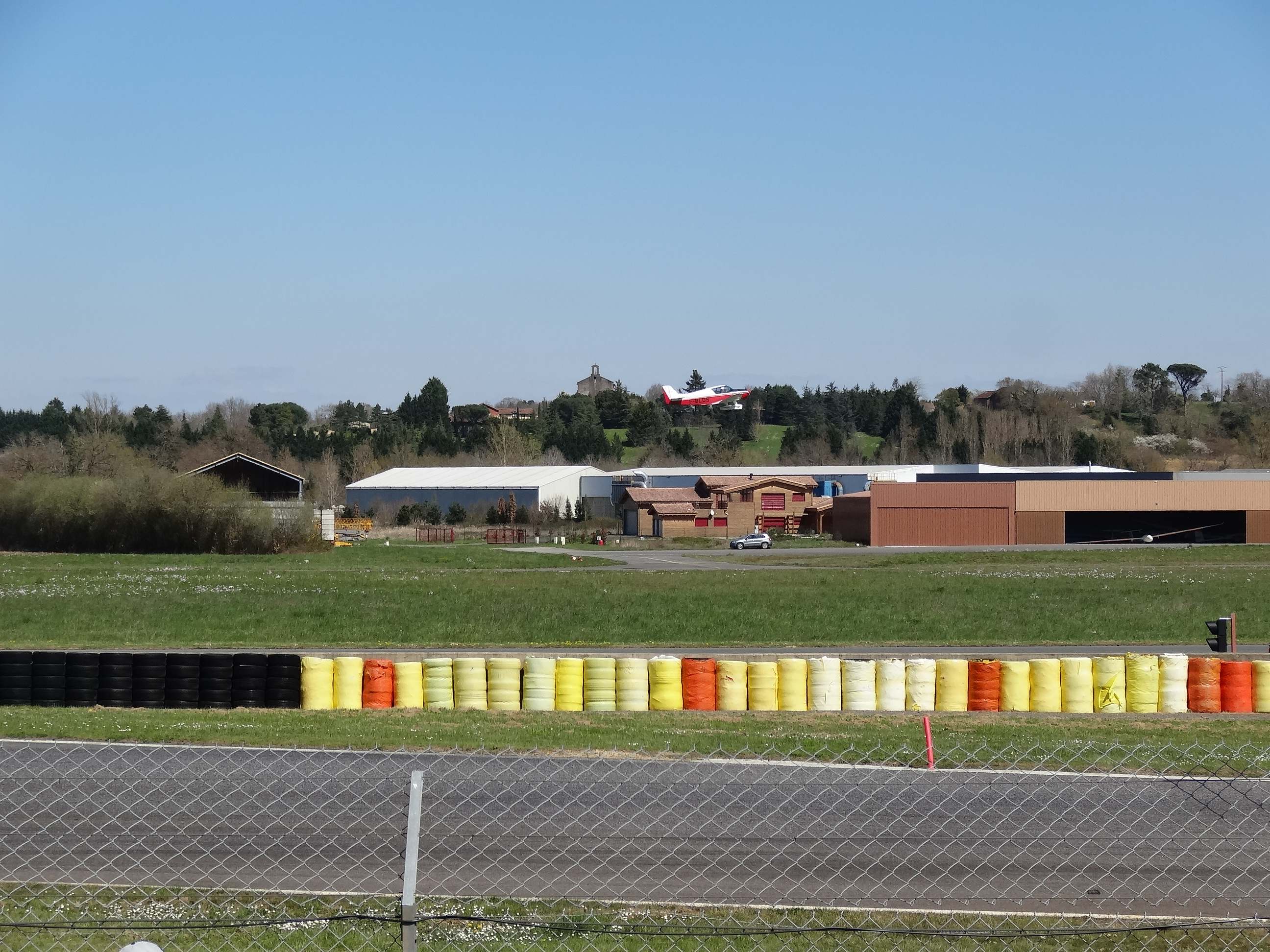 Aérodrome de Nogaro, vu depuis le circuit Paul Armagnac, ainsi que le village de Bouit